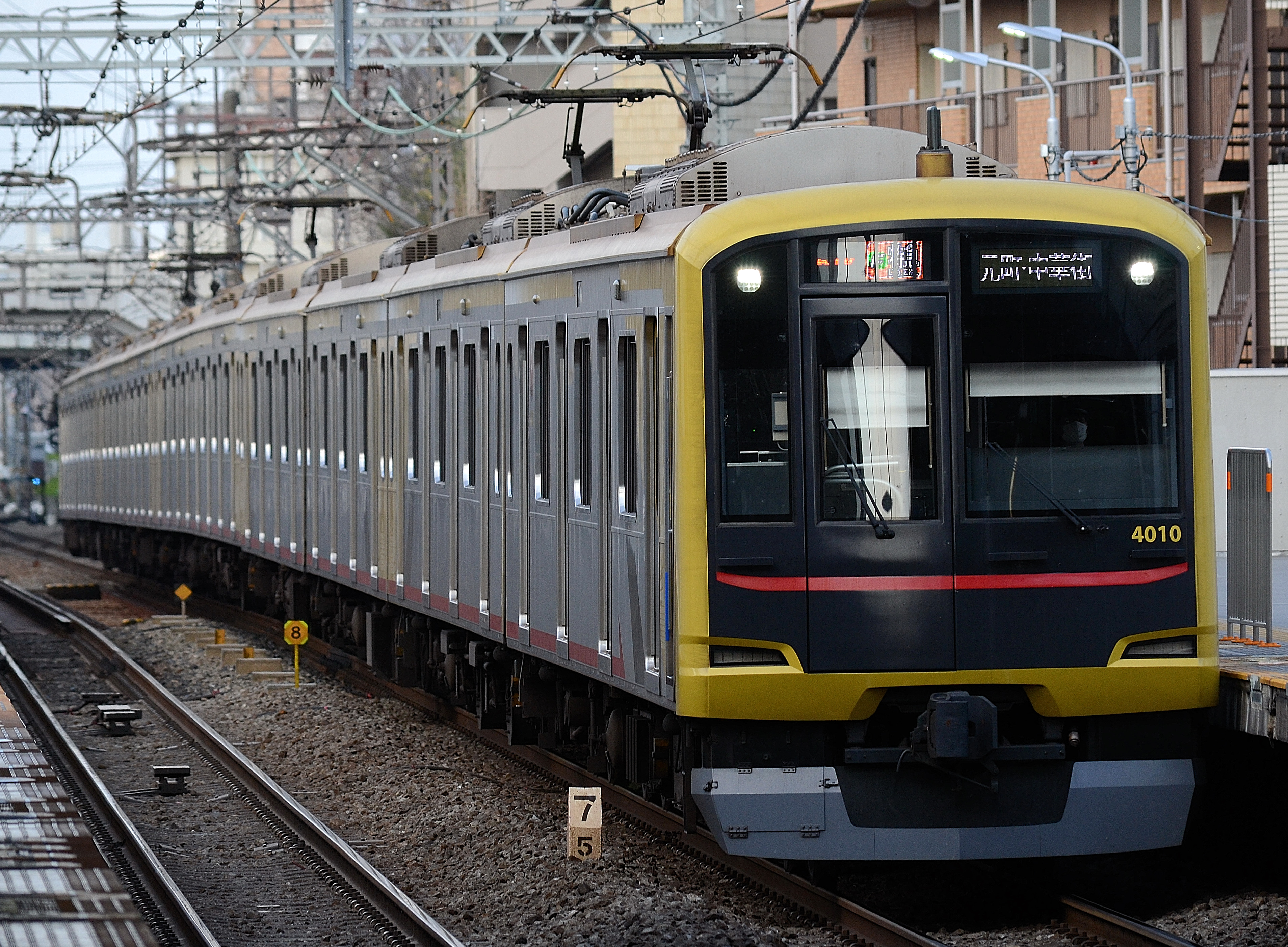 東横線、都立大学駅を通過する東急5050系4000番台「Shibuya Hikarie号」によるF特急｢元町・中華街」行き